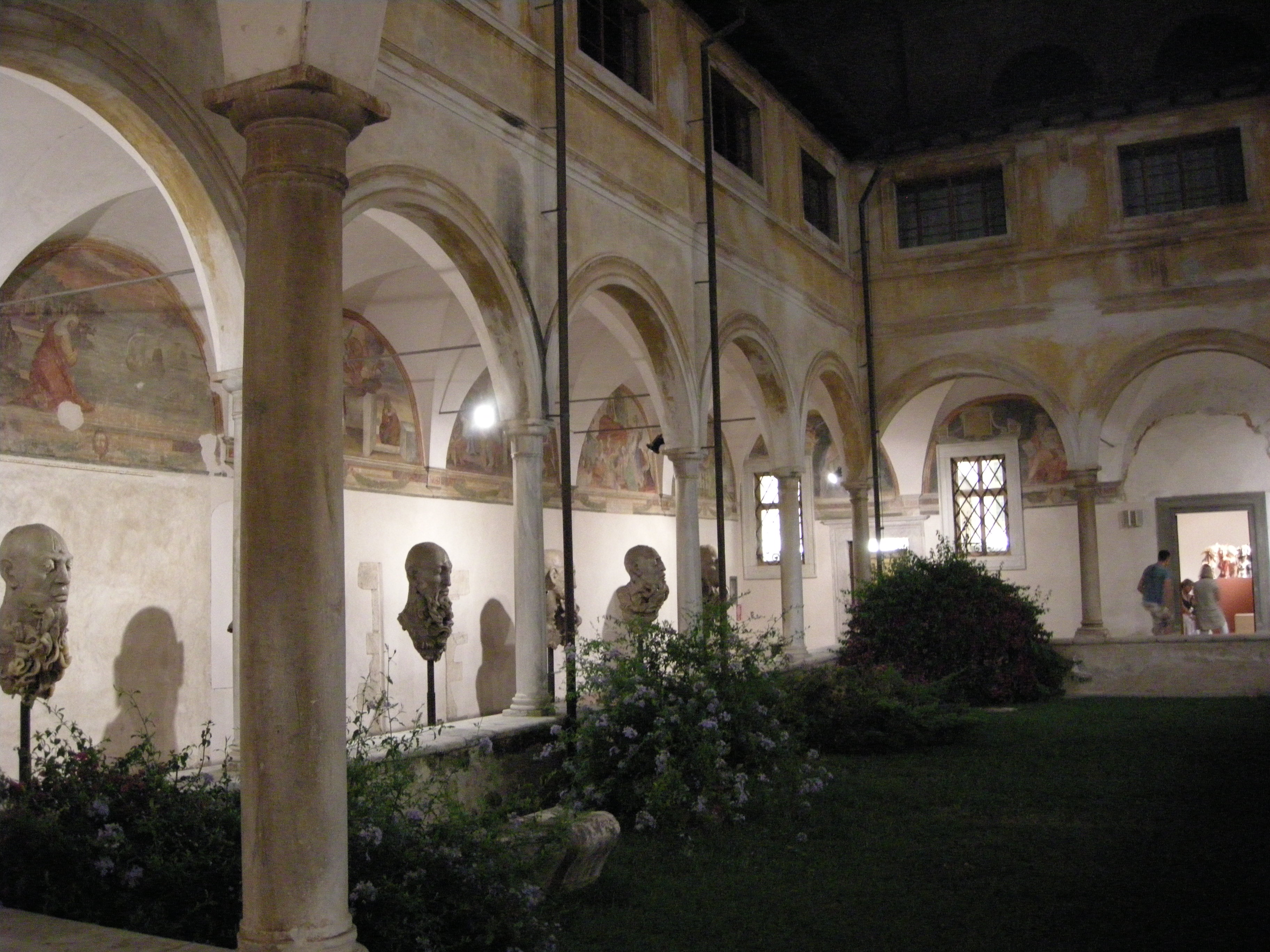 Chiostro di sant'agostino, pietrasanta